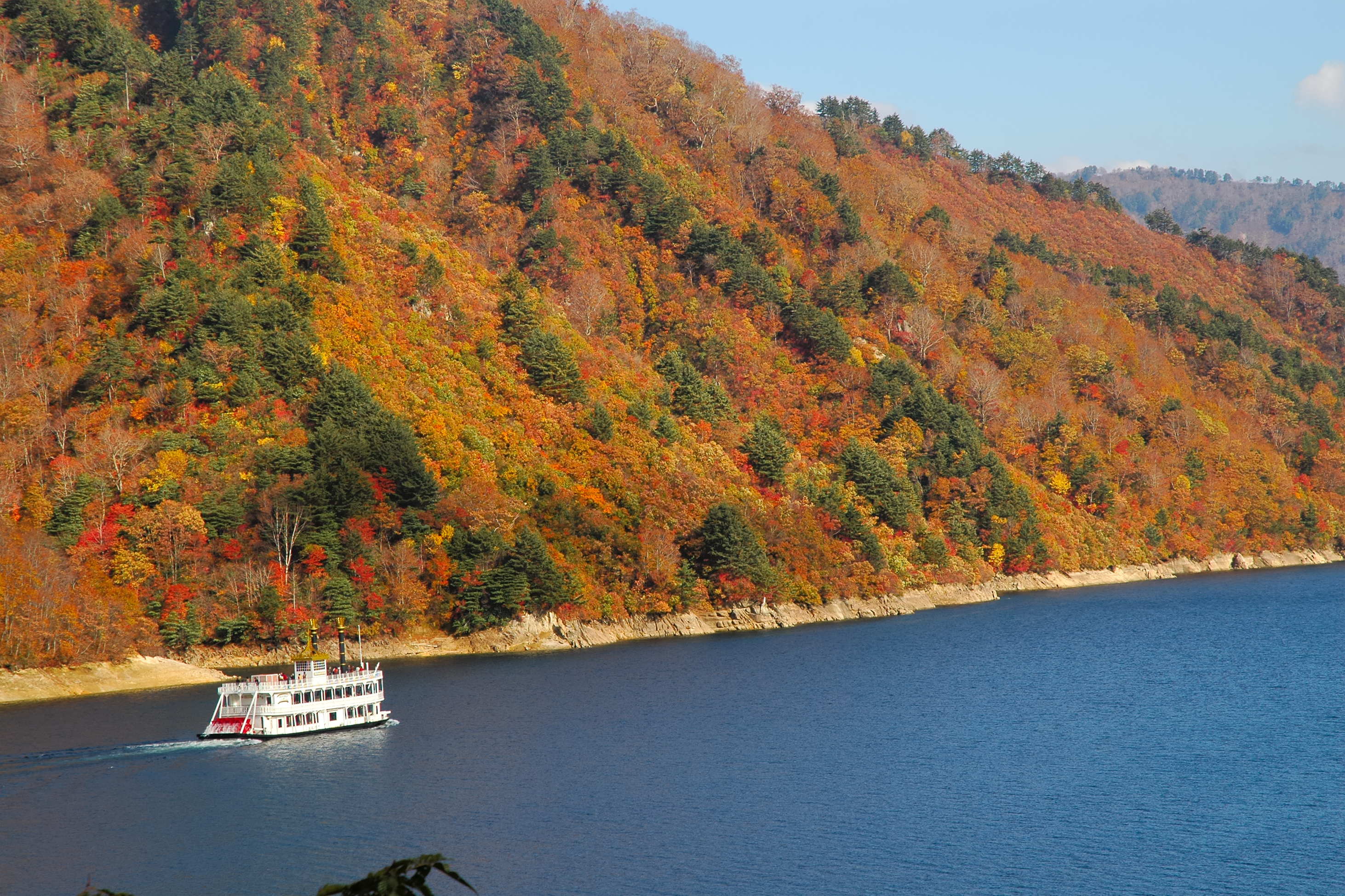 Lake Okutadami (奥只見湖)